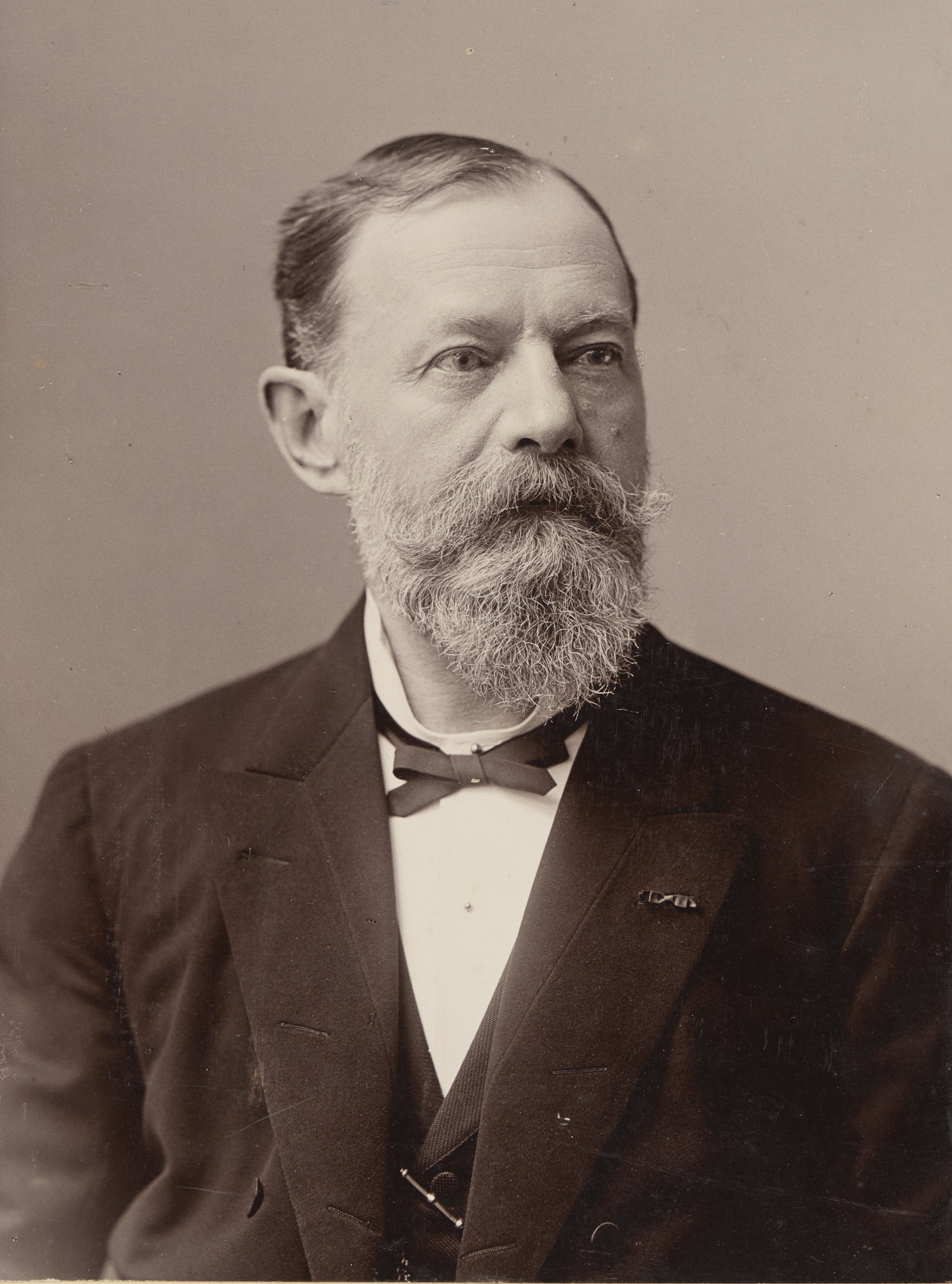 [Portret Zygmunta Władysława Laskowskiego] / [Fréd. Boissonnas, Genewa]